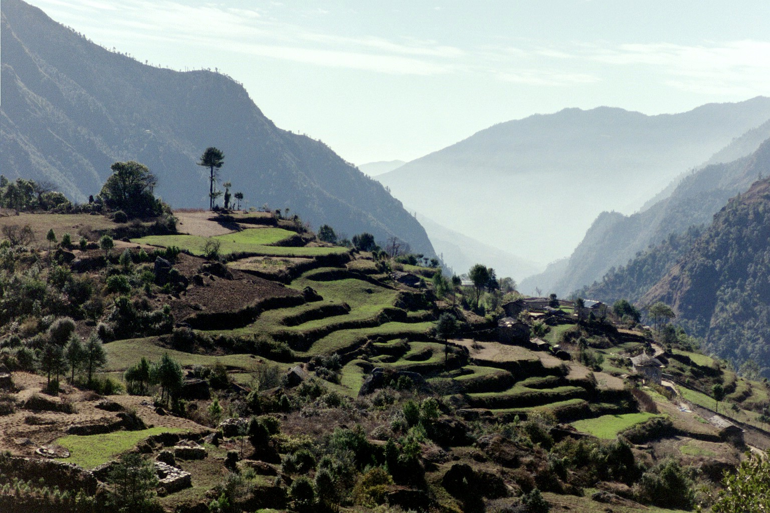 agriculture, Lukla, Nepal